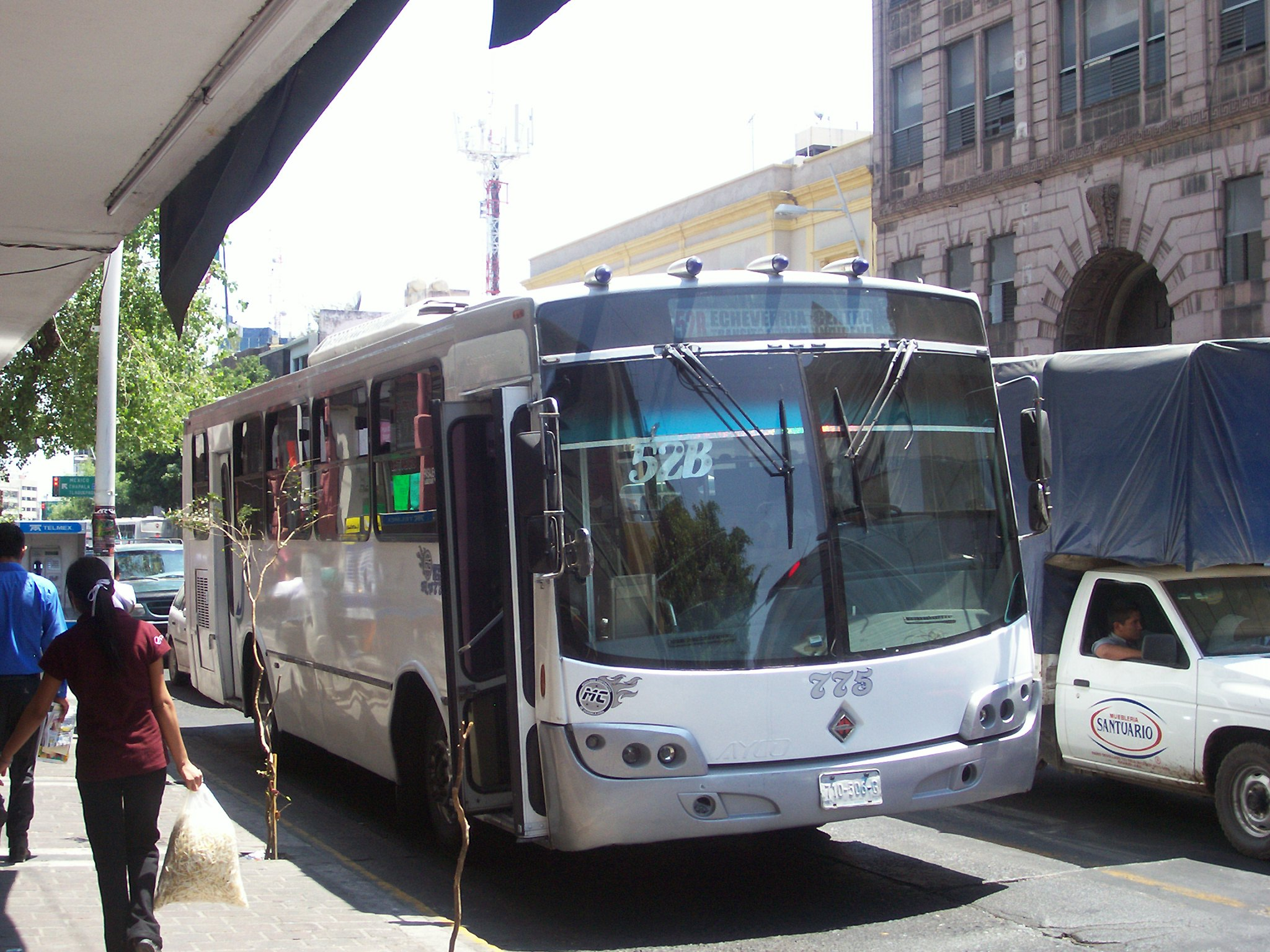 Autobus de la empresa de Transporte guadalajara, MC (Movilidad Corporativa de Guadalajara)